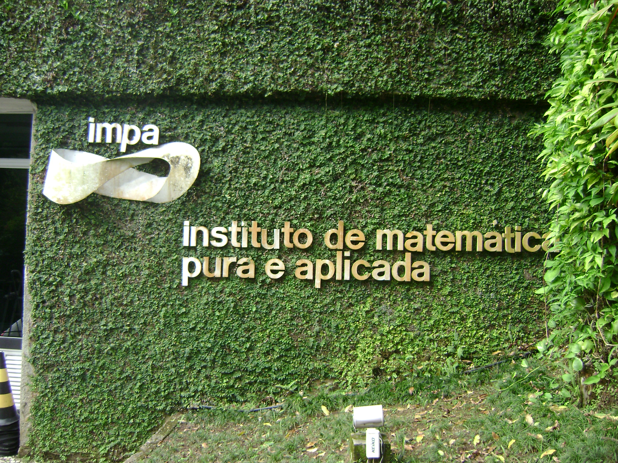 Entrada do IMPA, na cidade do Rio de Janeiro, Brasil.